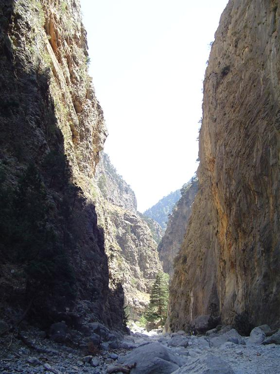 Samaria gorge